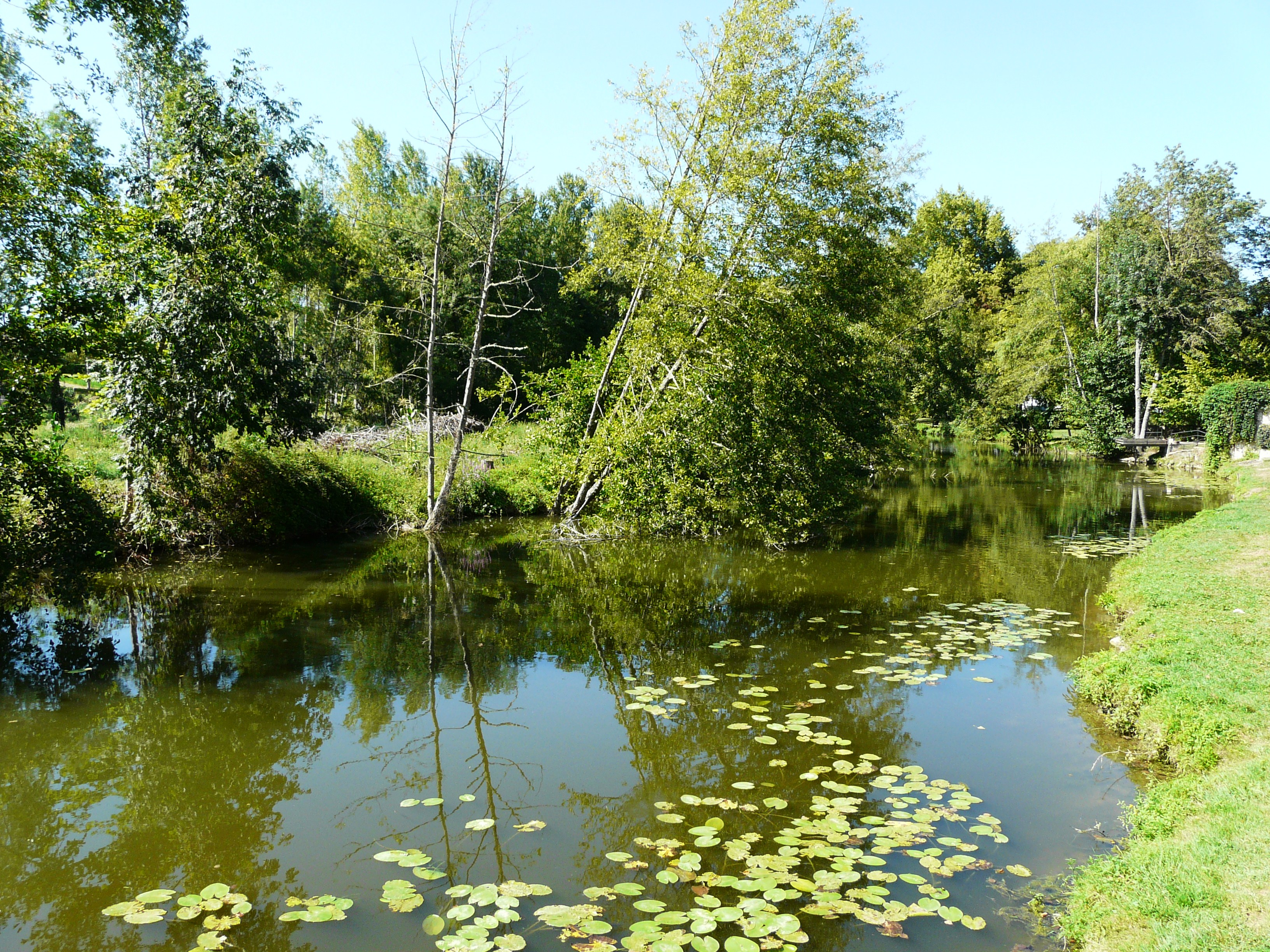 Le Dropt à Eymet, Dordogne, France